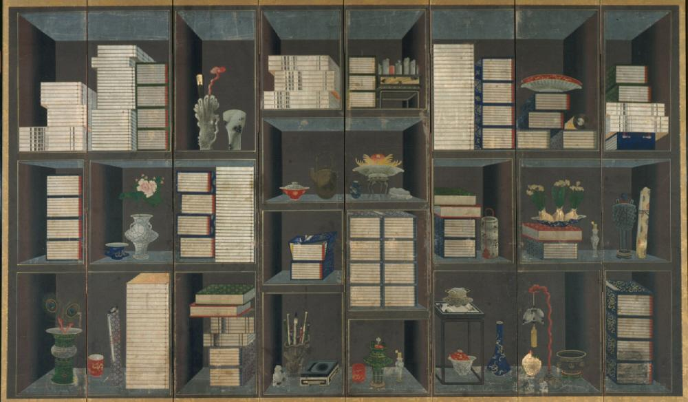 Scholar's books and things (Chaekgeori)